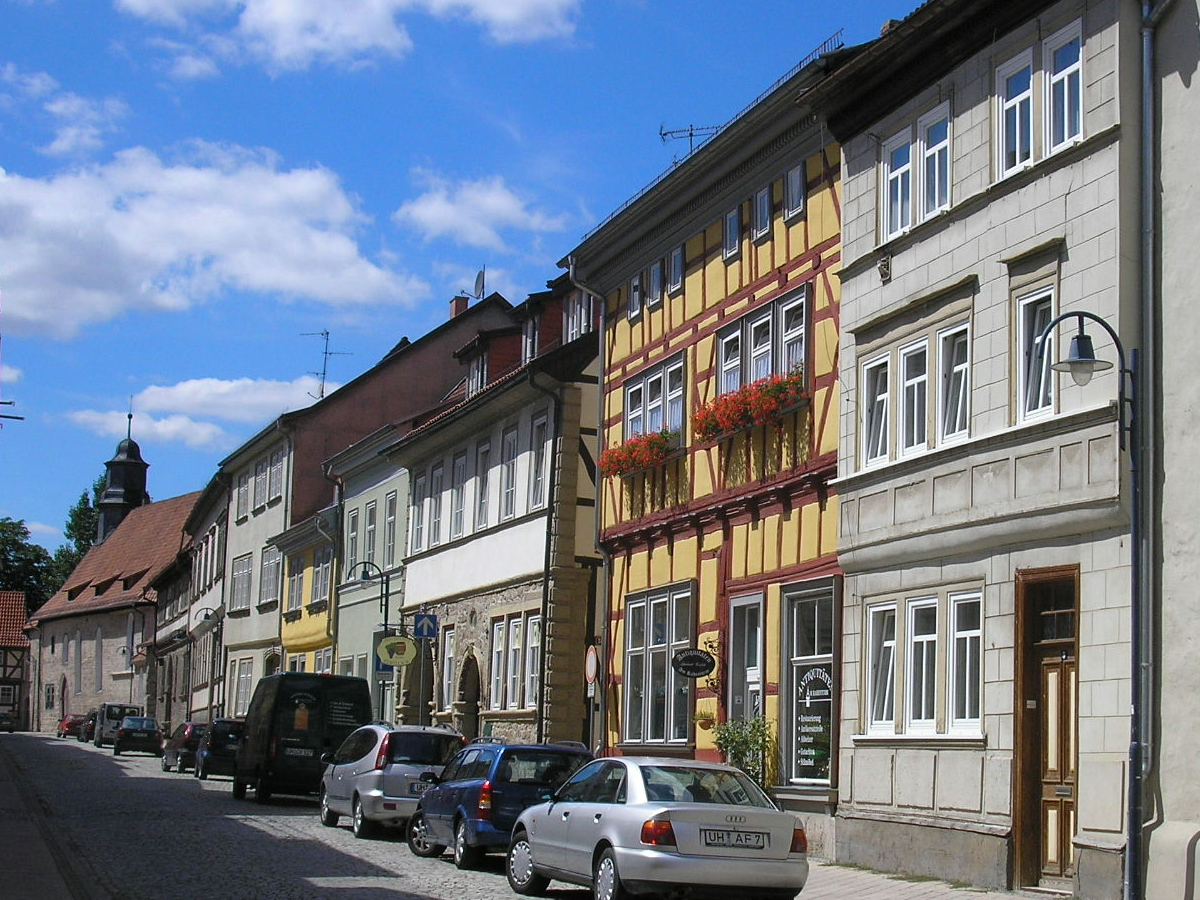 Blick durch die Holzstraße in Mühlhausen (Thüringen).